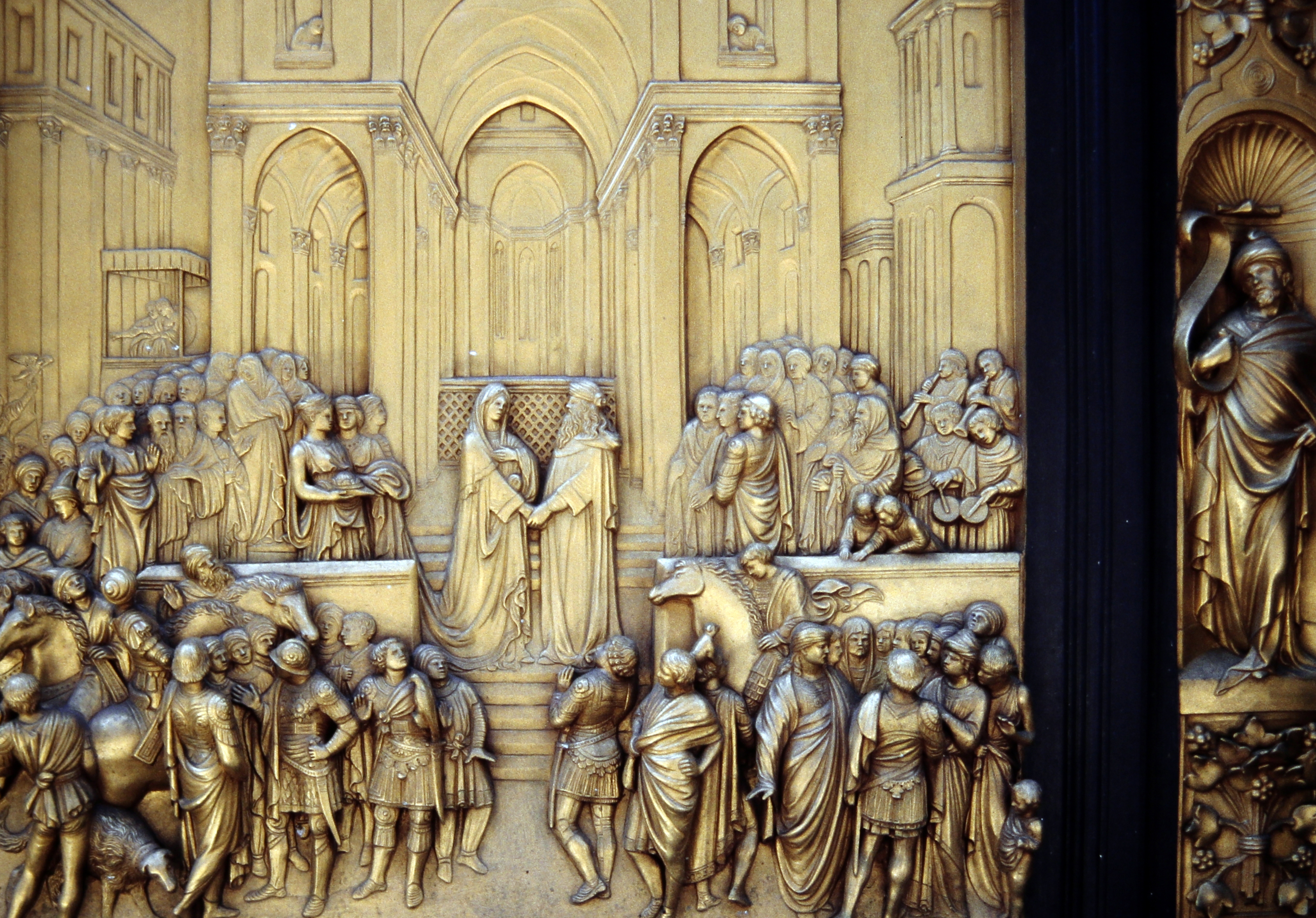 Detail der Paradiestür von Lorenzo Ghiberti